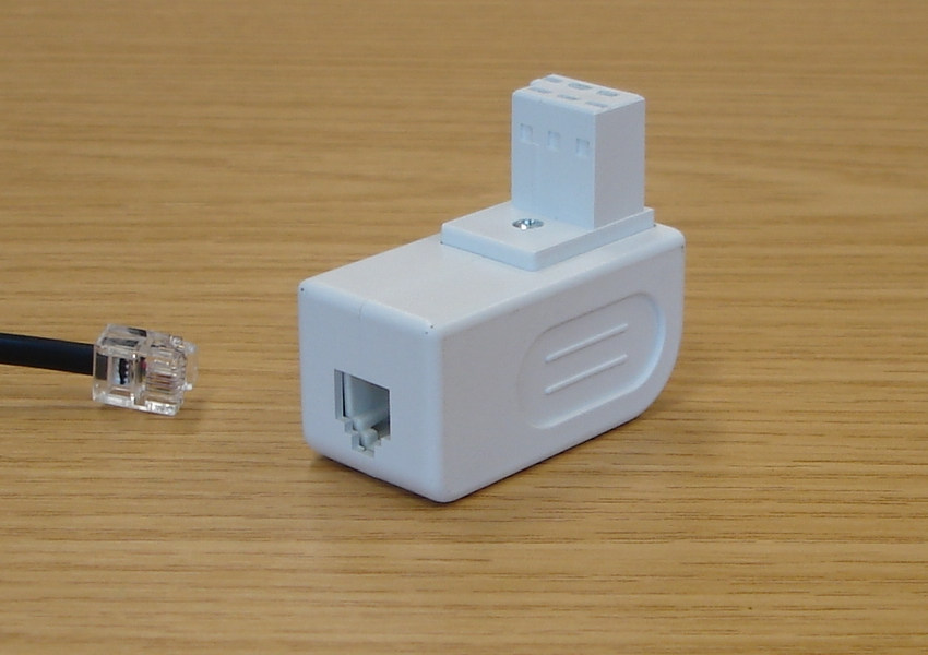 Telefonadapter RJ11 (Deutschland, USA, Spanien, Portugal, Griechenland) → Schweiz System Reichle